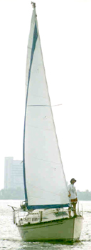 Description: Génois (voile avant) d'un voilier. Photo prise sur le lac des Deux-Montagnes au Québec (Canada).